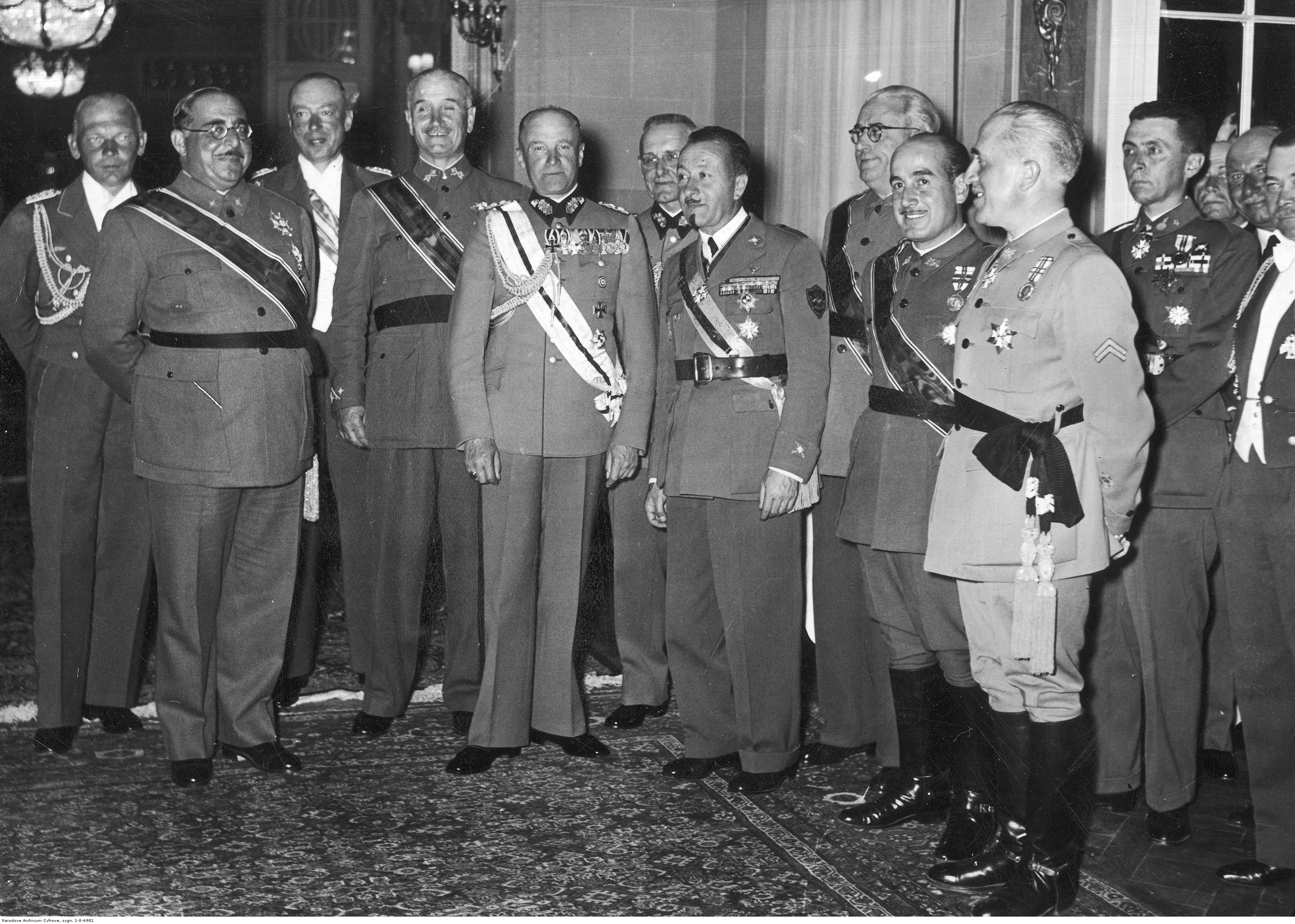 Comitiva de generales españoles en Berlín, durante el viaje de vuelta de la Legión Cóndor a Alemania. En la foto aparecen: Walther von Brauchitsch: General, comandante en jefe del Ejército alemán. Wolfram von Richthofen: General de la Luftwaffe, antiguo comandante de la Legión Cóndor. Gonzalo Queipo de Llano: General, comandante del Ejército del Sur. Juan Yagüe Blanco: General, comandante del Cuerpo de Ejército Marroquí. Antonio Aranda Mata: General.